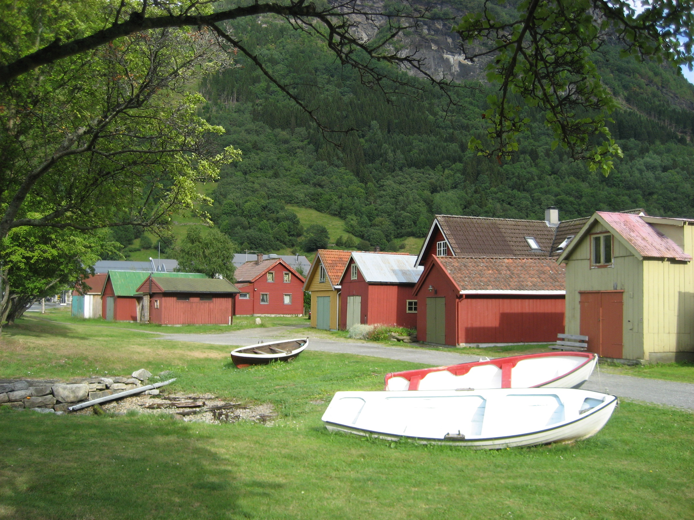 Bootshäuser in Vik - Norwegen